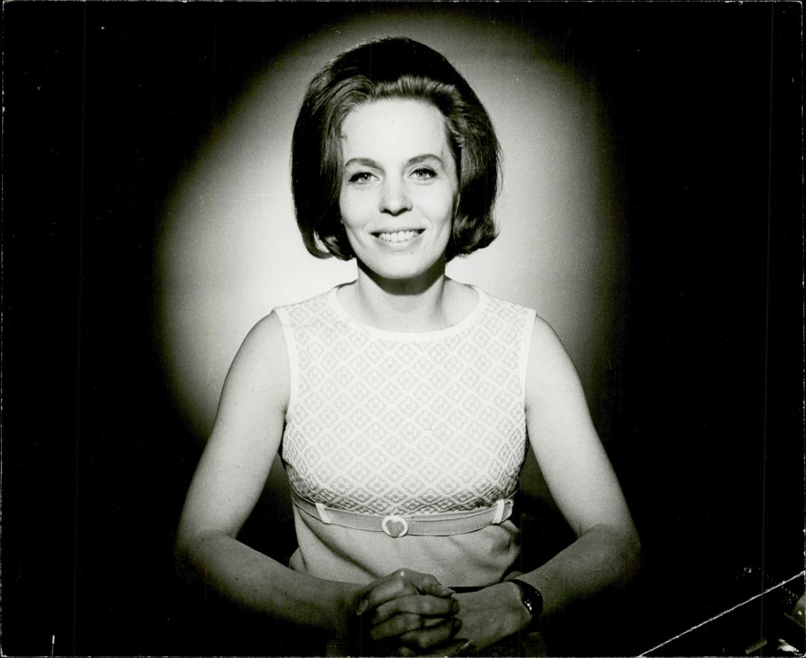 Foto på Alicia Lundberg infört i Svensk Damtidning 1968:52.